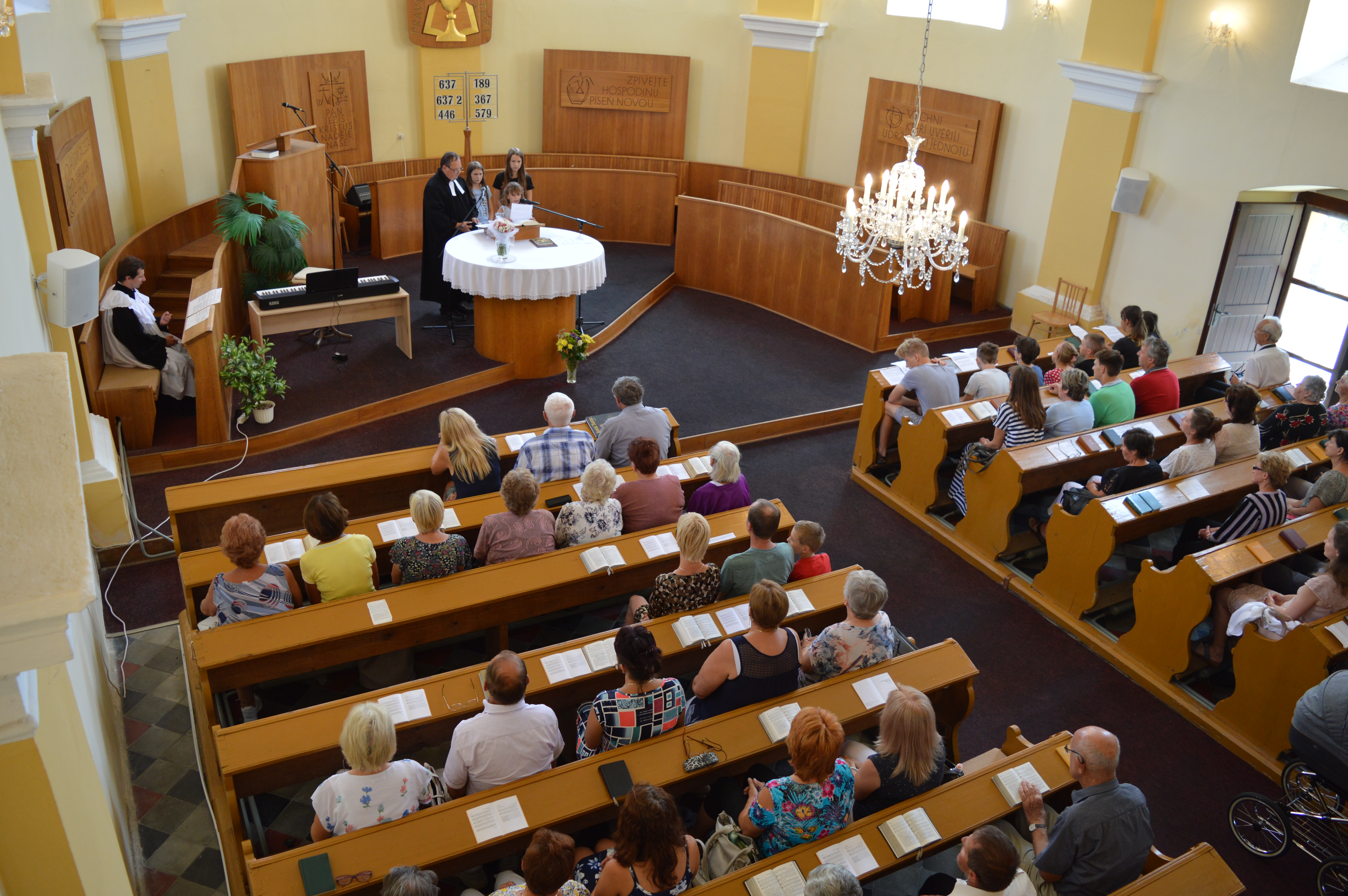 V Prusinovicích slouží jednoduchou liturgii kalvínského ritu. Rozvržení presbytáře má navodit starocírkevní atmosféru shromáždění okolo stolu.